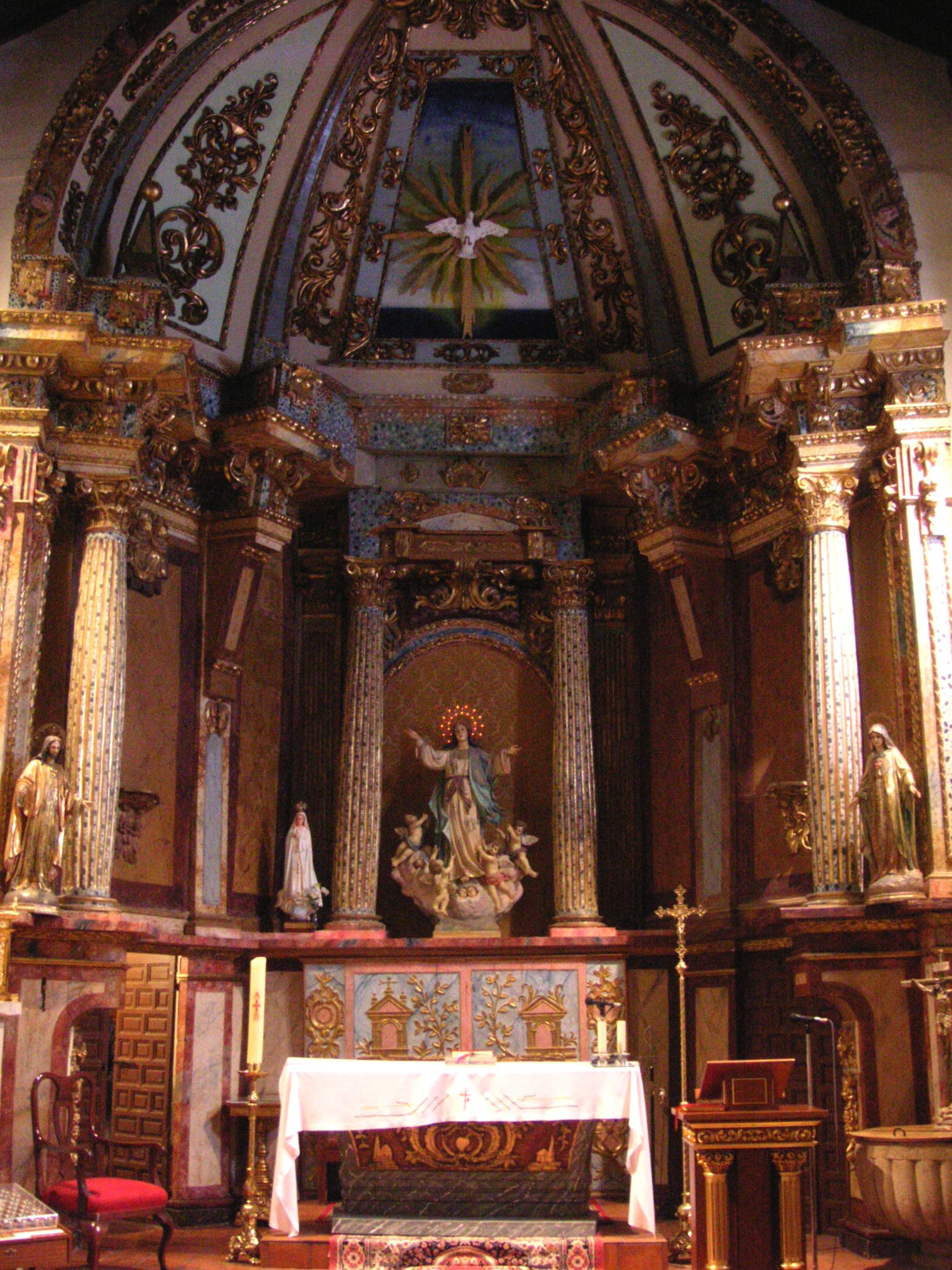 Retablo de la iglesia de la Asunción de Nuestra Señora de Valdepiélagos